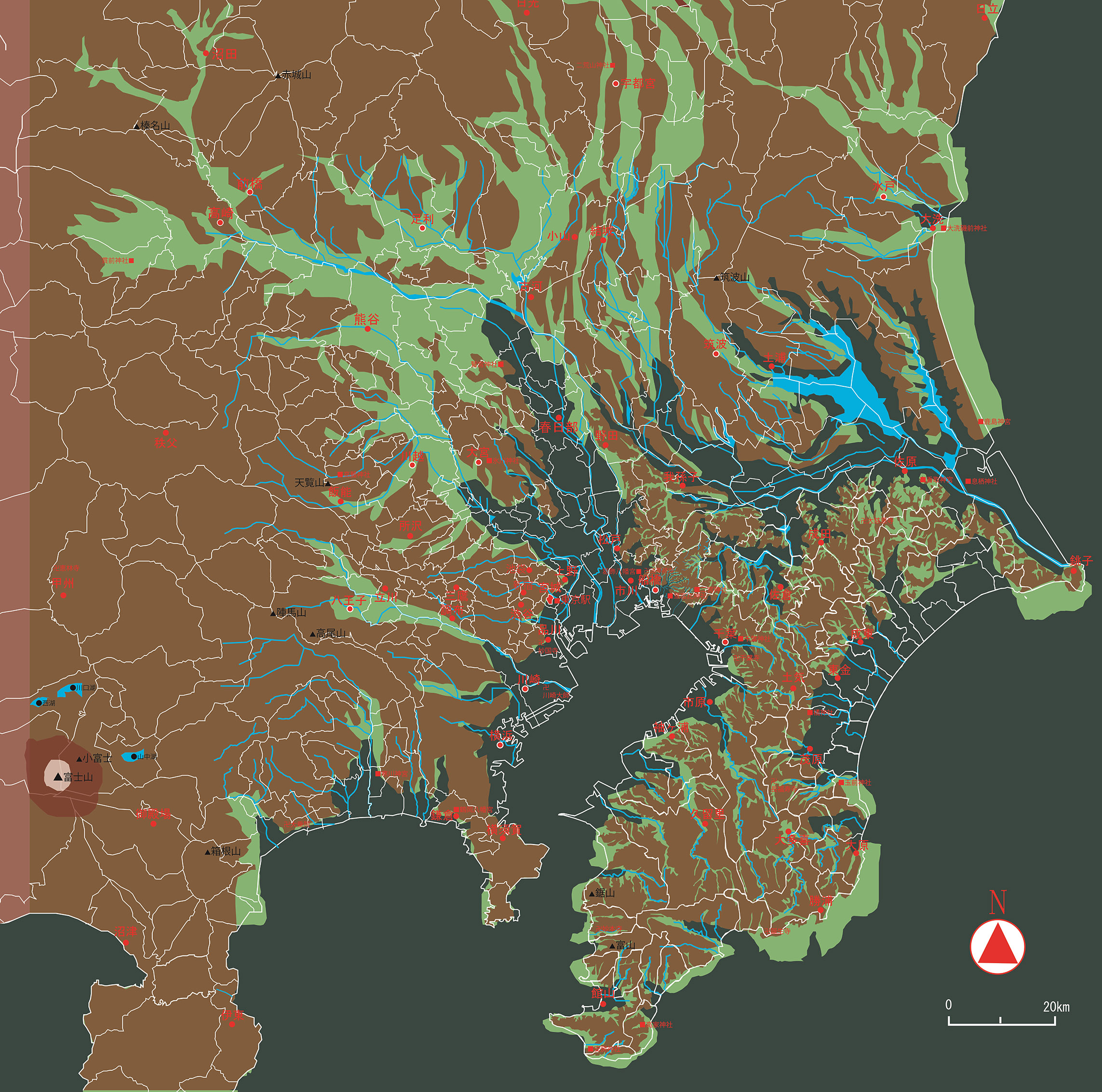 坂東（東国）地方の古代の地形（陸地と海面）を示したマップ